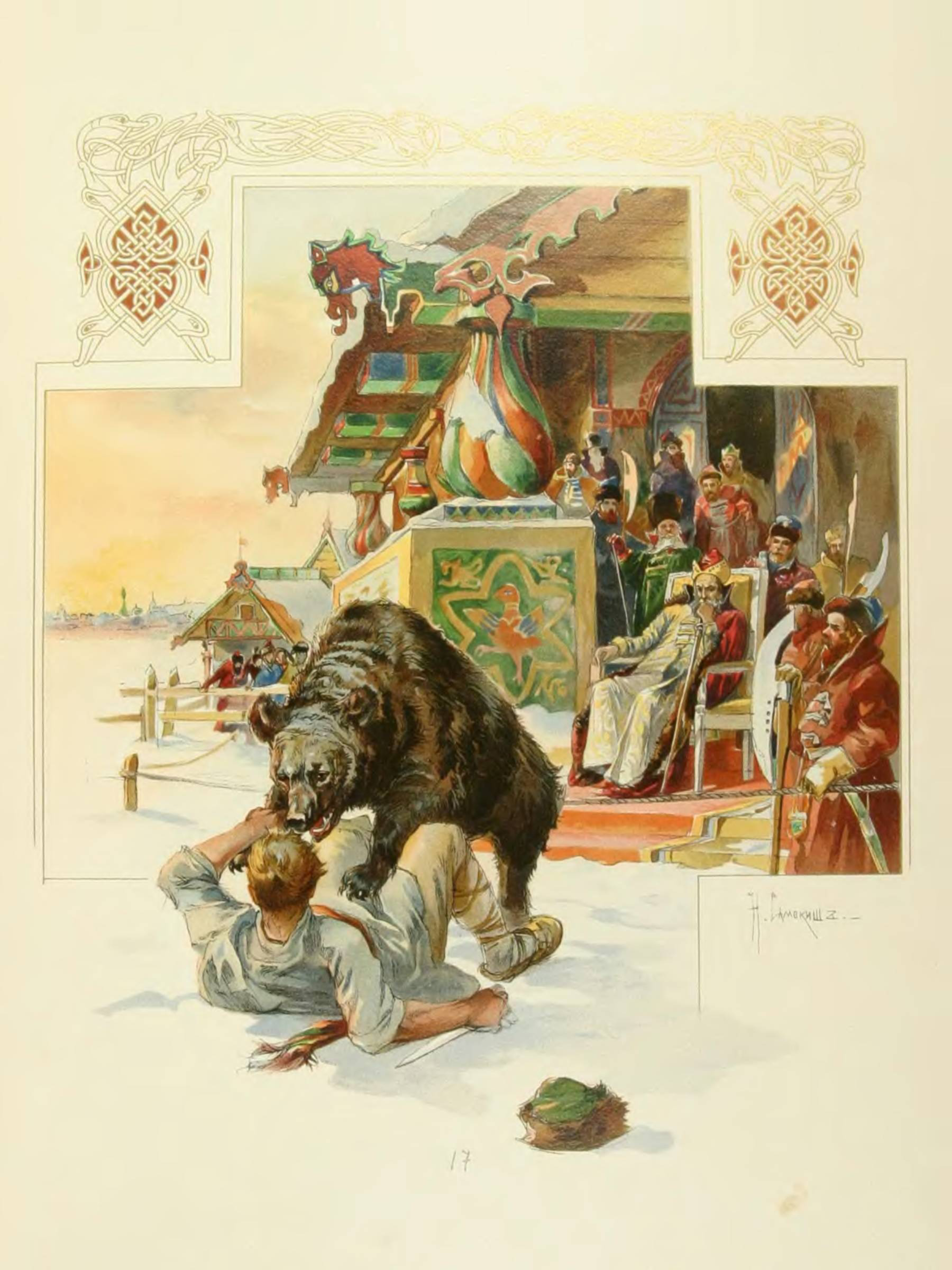 Потеха при царе Иоанне Васильевиче Грозном. С акварели Н. Самокиша. Великокняжеская, царская и императорская охота на Руси